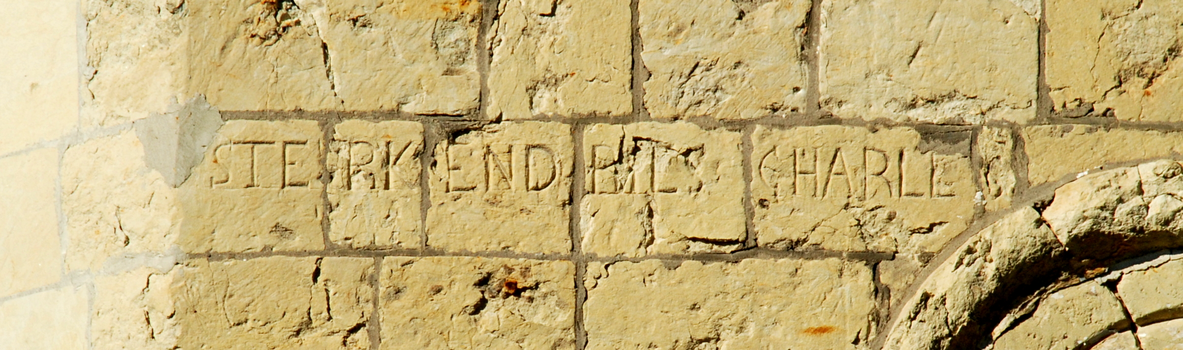 Belgique - Brabant wallon - Hélécine - Linsmeau - Chapelle Notre-Dame de la Colombe